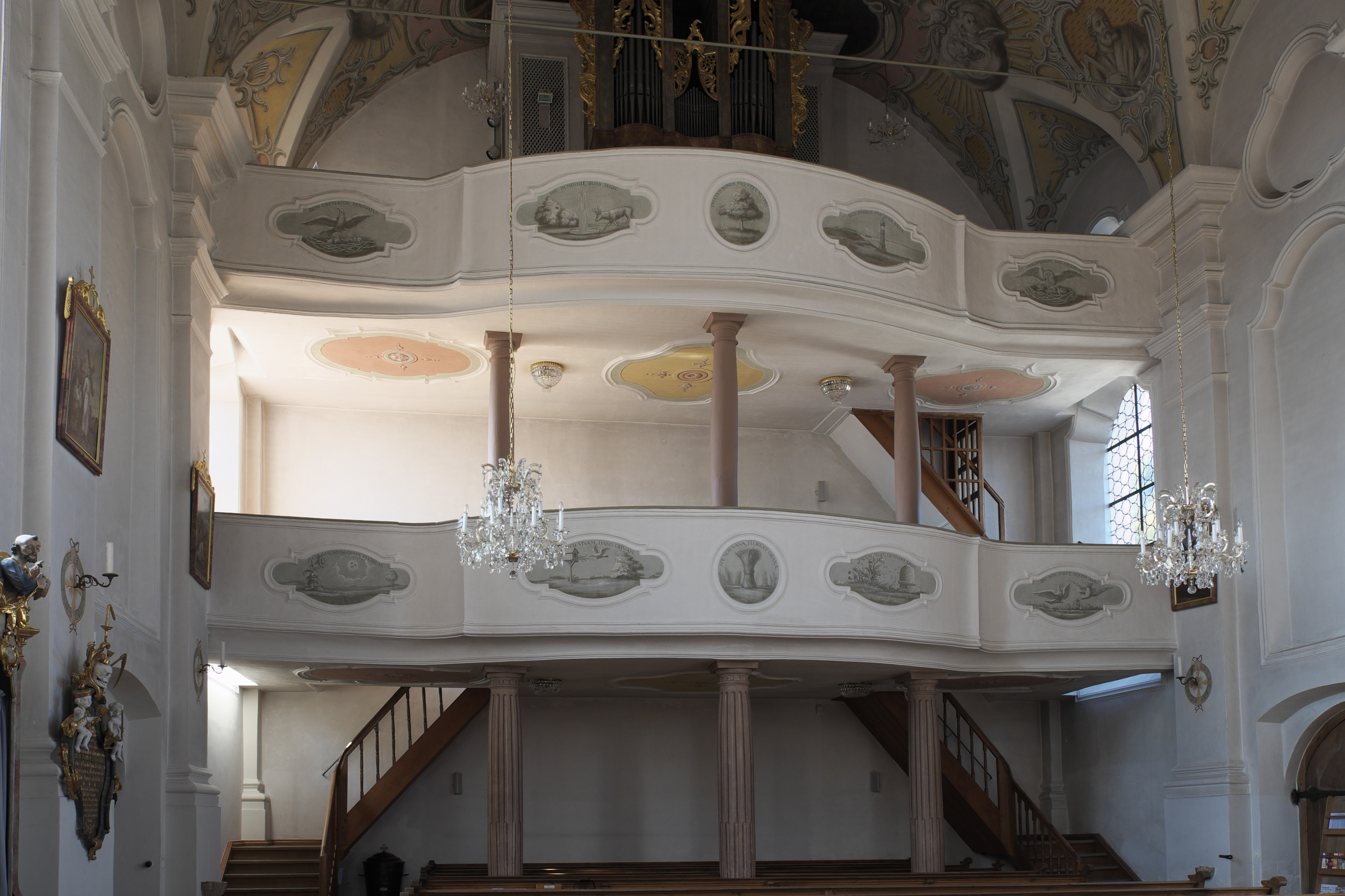 Katholische Pfarrkirche St. Jakobus in Vierkirchen im Landkreis Dachau (Bayern/Deutschland), emblematische Darstellung an der Empore (Fresko)